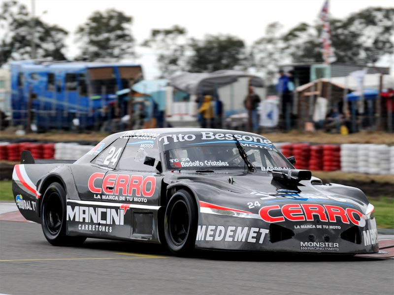 La siguiente es una fotografía del automóvil Dodge Cherokee del piloto Ernesto Bessone. La misma fué tomada por Cholo Cano, fotógrafo de Argentina y publicada en su sitio web: La misma fue solicitada para su publicación en Wikipedia como lo exigen las leyes de Copyright.